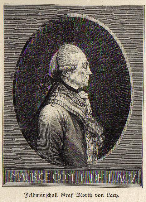 Graf Franz Moritz von Lacy